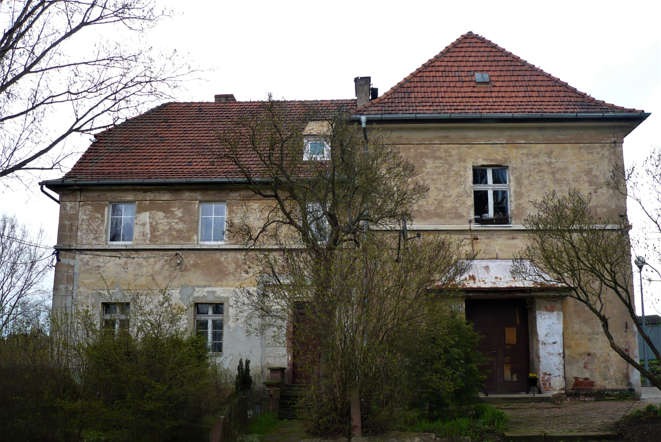 Szkoła w Suszynie